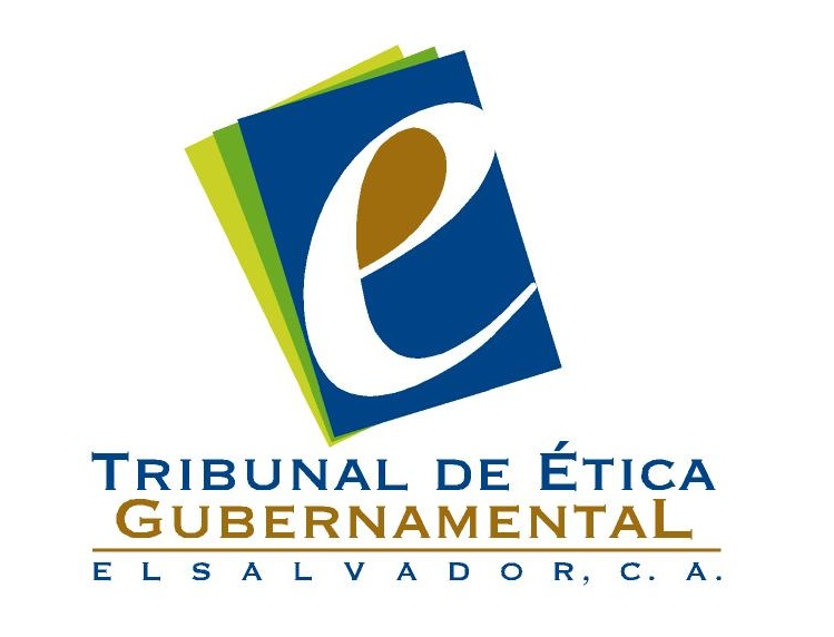 Logo del Tribunal de Ética Gubernamental